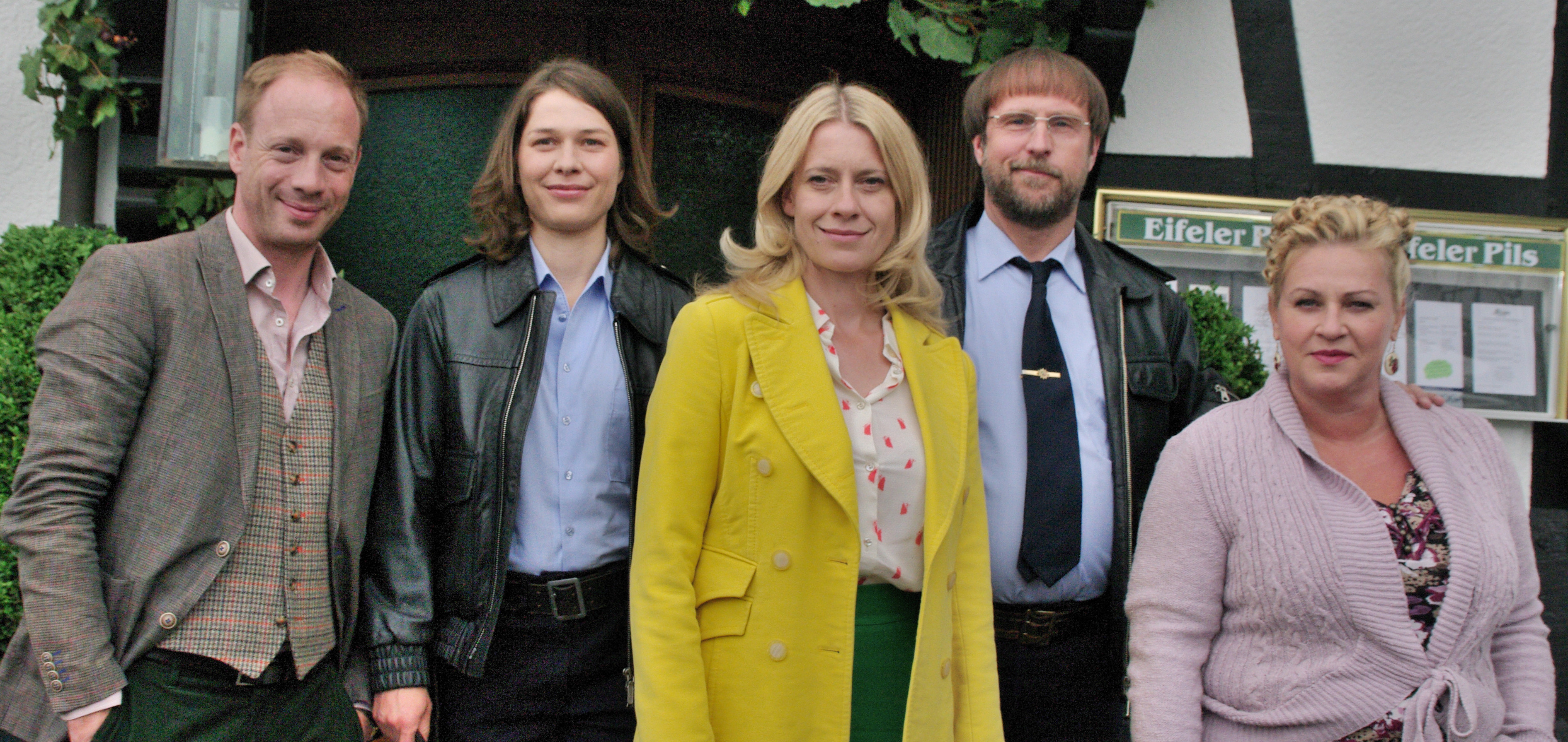 Settermin ARD Serie "Mord mit Aussicht" am 13-Juni 2014 in Neunkirchen-Seelscheid v.l.n.r.: Johann von Bülow, Meike Droste, Caroline Peters, Bjarne Mädel, Petra Kleinert